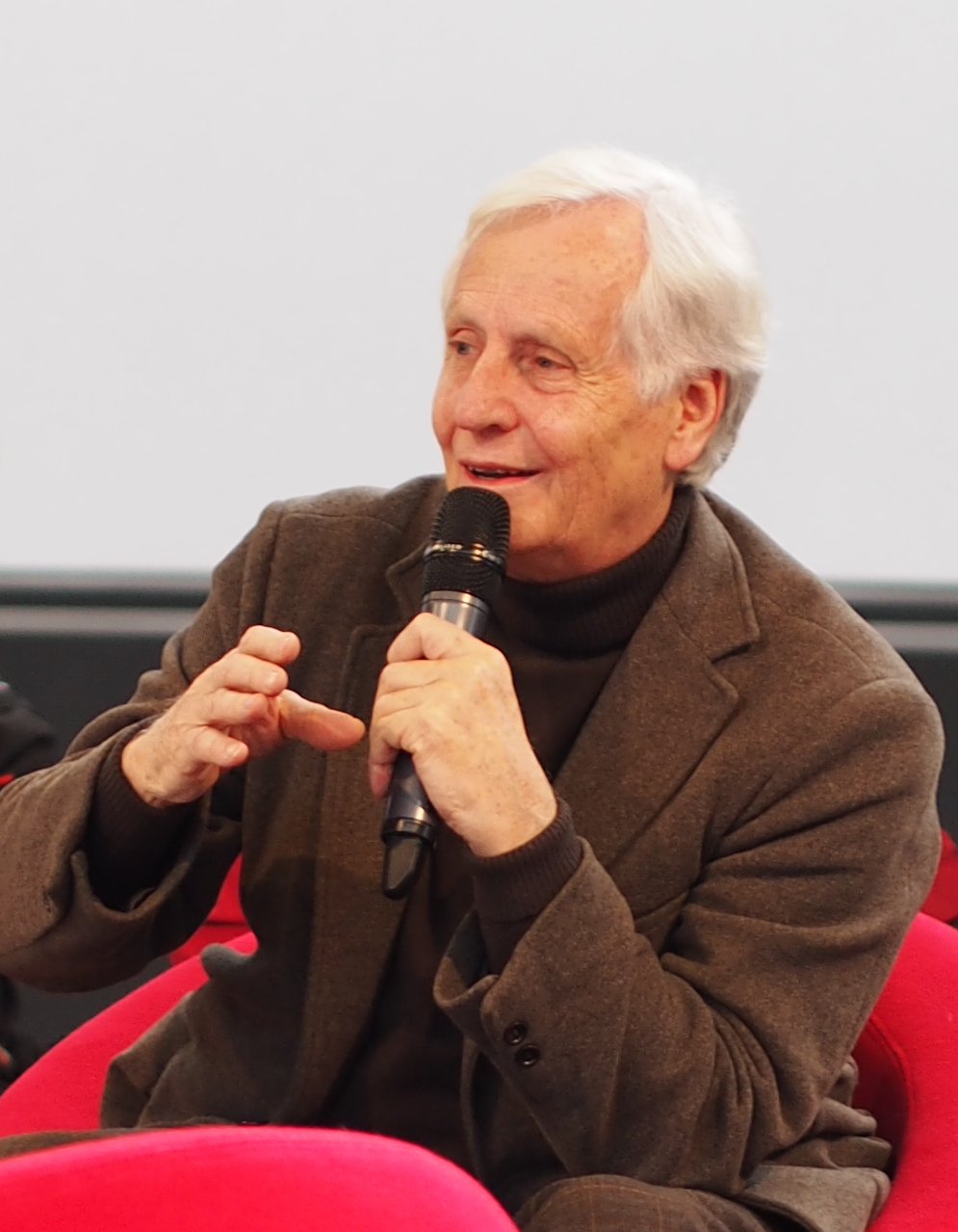 Le philologue et helléniste français Heinz Wismann au Salon du livre de Paris le 24 mars 2013.